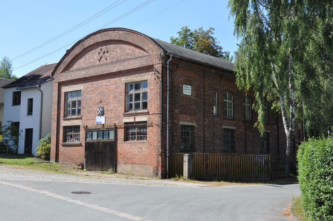 Kaisergrube, Gersdorf